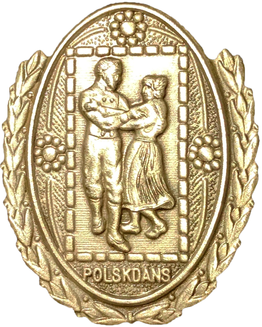 Avbildar märke